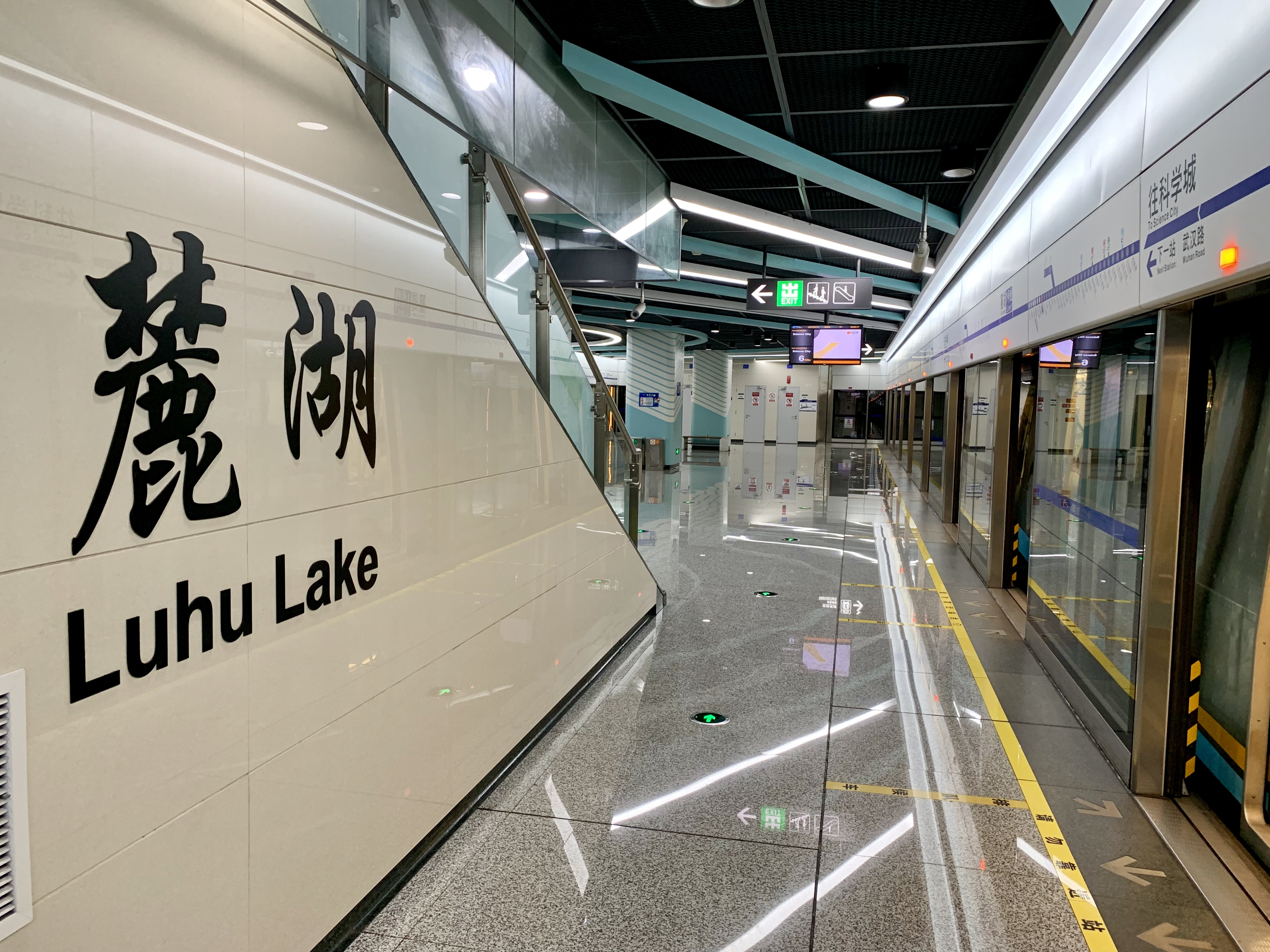 成都地铁麓湖站